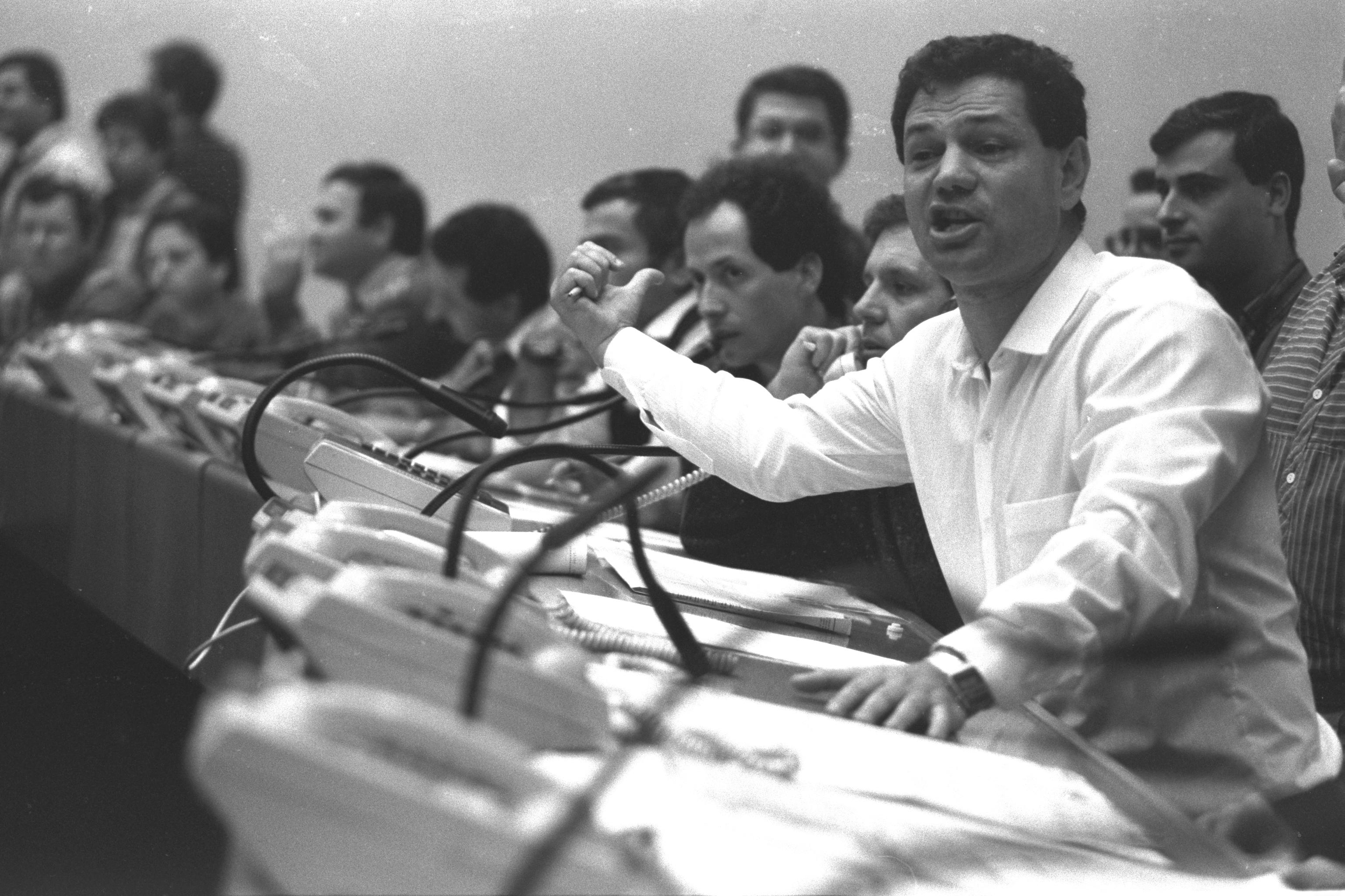 A broker giving an order to purchase stocks at the Tel Aviv Stock Exchange. ברוקר נותן הוראה לרכוש מניות בבורסה לניירות ערך בתל אביב 01/08/1989